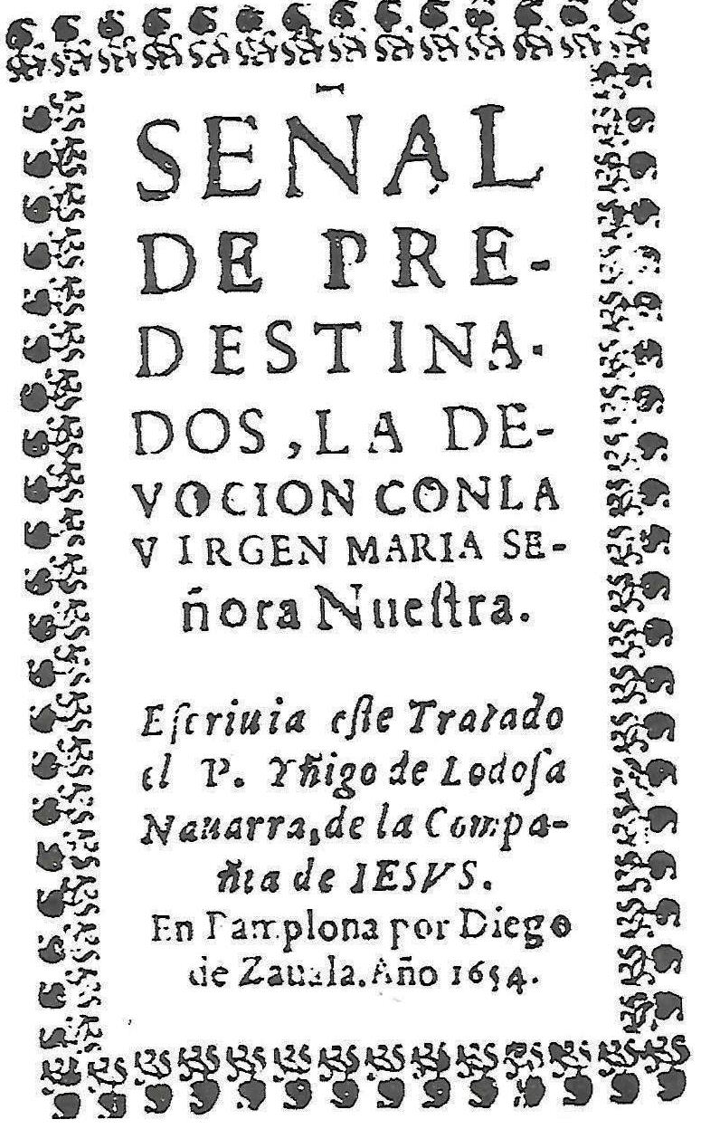 Diego de Zabala, Pamplona, 1654. Señal de predestinados..., Iñigo de Lodosa